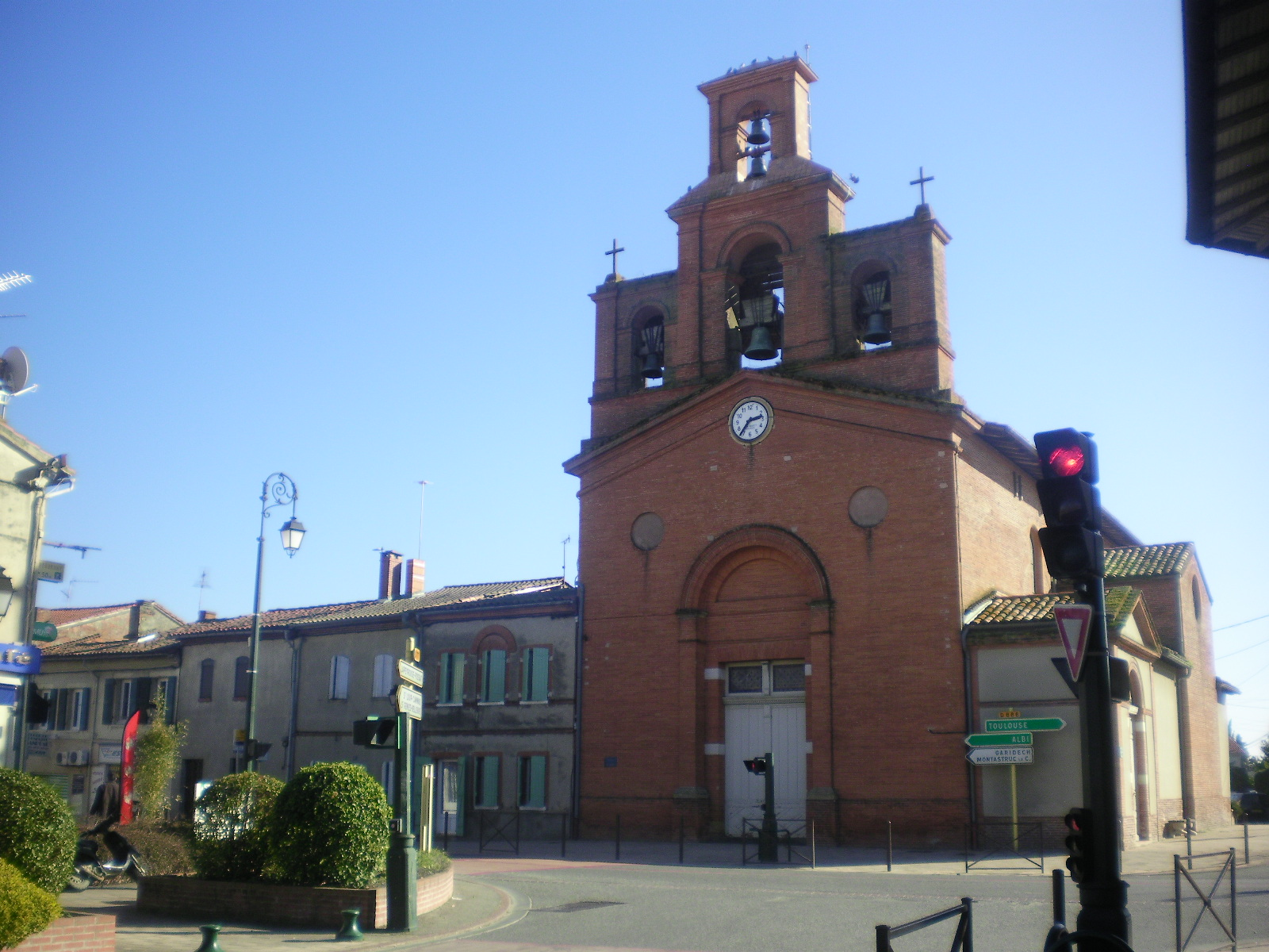 église castelmaurou